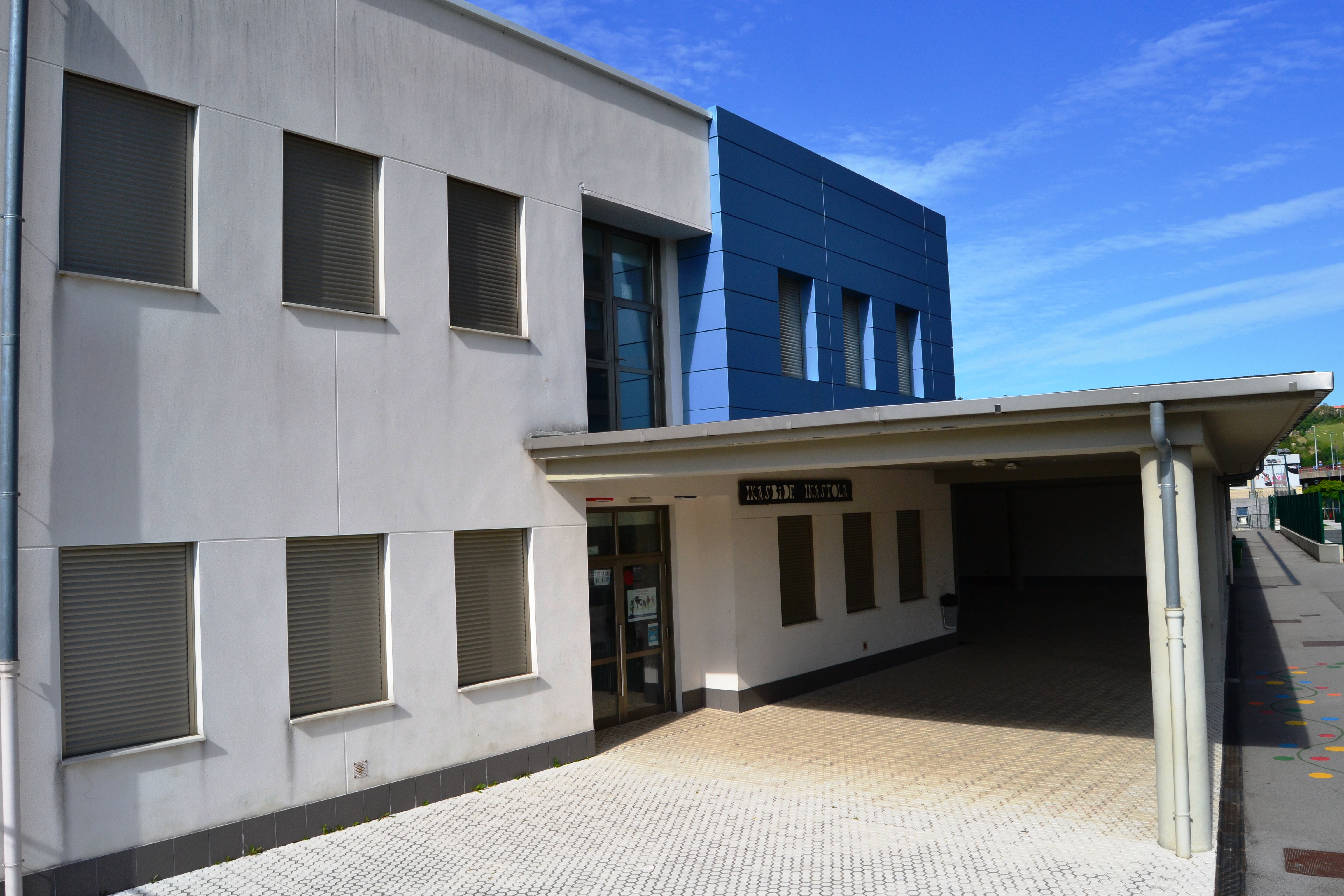 Ikasbide Ikastolaren eraikin nagusia